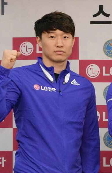 LG전자, ‘스켈레톤’ 국가대표팀 공식 후원 ‘선수들의 열정을 응원합니다!’ ■ 2일 송파구 올림픽파크텔에서 ‘스켈레톤’ 국가 대표팀 공식 후원 조인식 개최 ■ 향후 3년간 메인 스폰서로서 국내외 전지 훈련, 장비 등 지원 ■ 국가 대표팀, 올해 국제 대회서 은메달 1개, 동메달 2개 획득 등 역대 최고 성적 이어가 ■ 한국영업본부장 최상규 사장 “‘스켈레톤’ 활성화를 위한 지속적인 관심과 지원을 아끼지 않을 것”